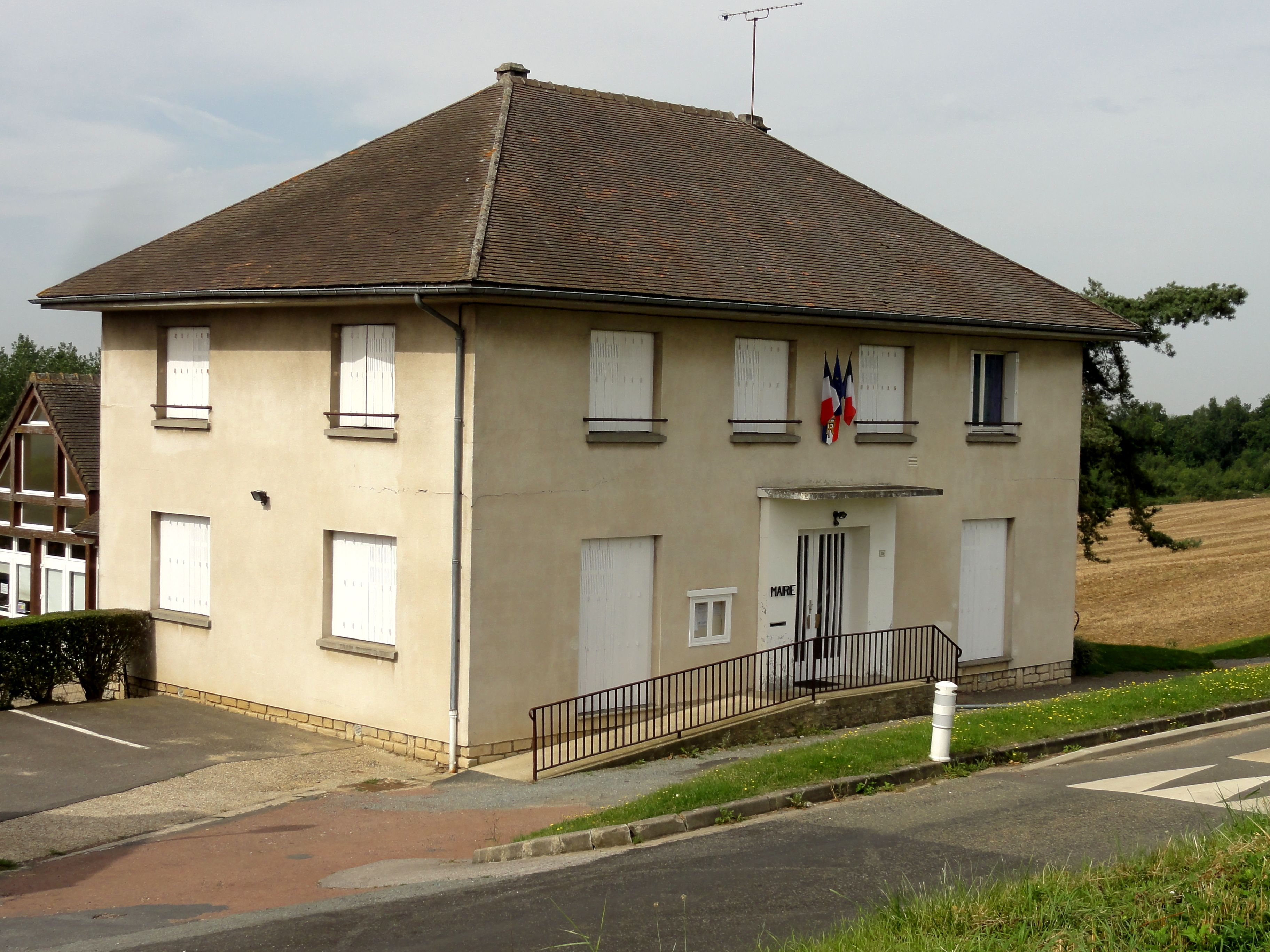 La mairie, rue de la Mairie.